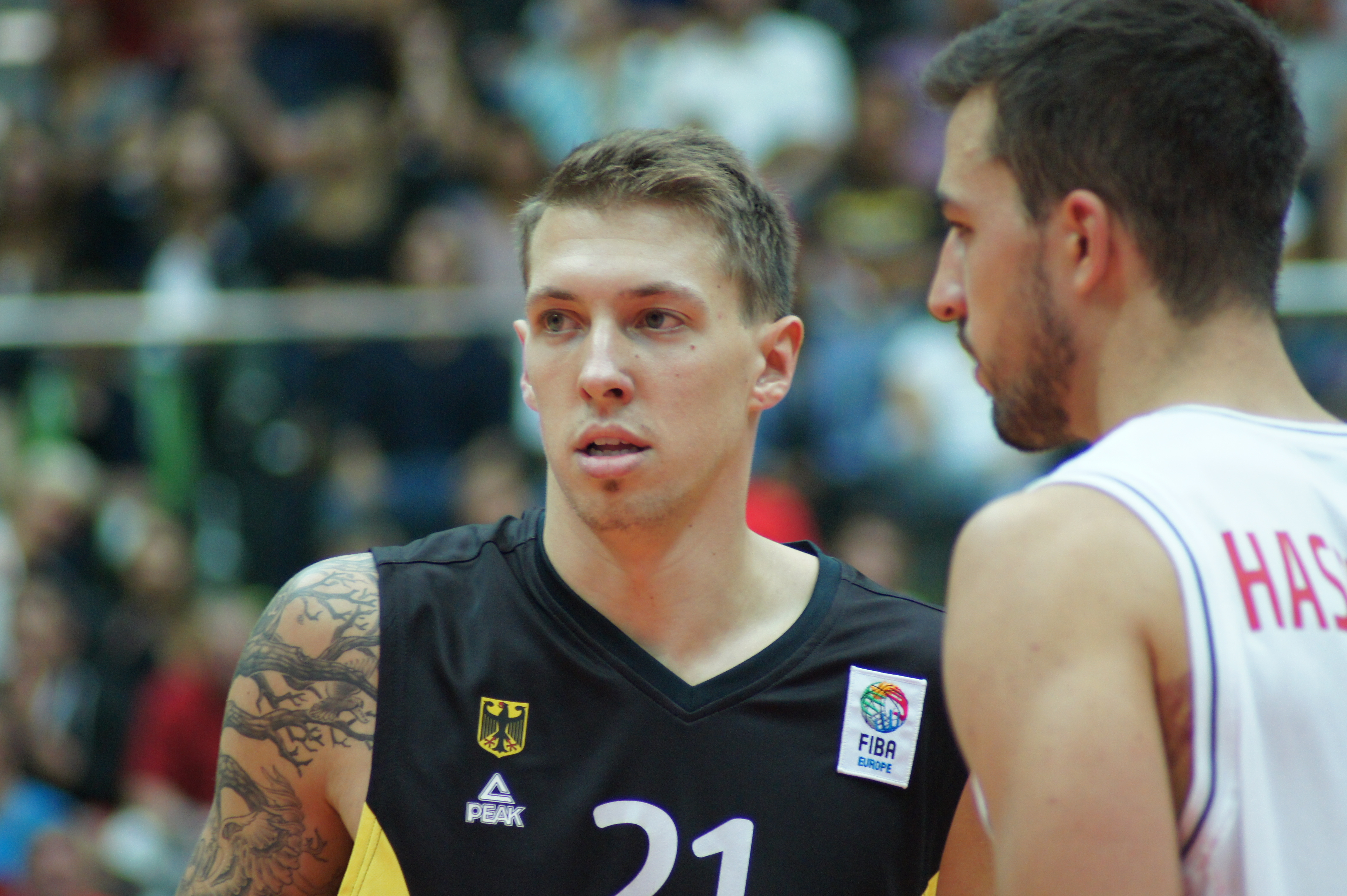 Qualifikationsspiel EuroBasket Österreich - Deutschland, 13. August 2014 im Multiversum Schwechat.